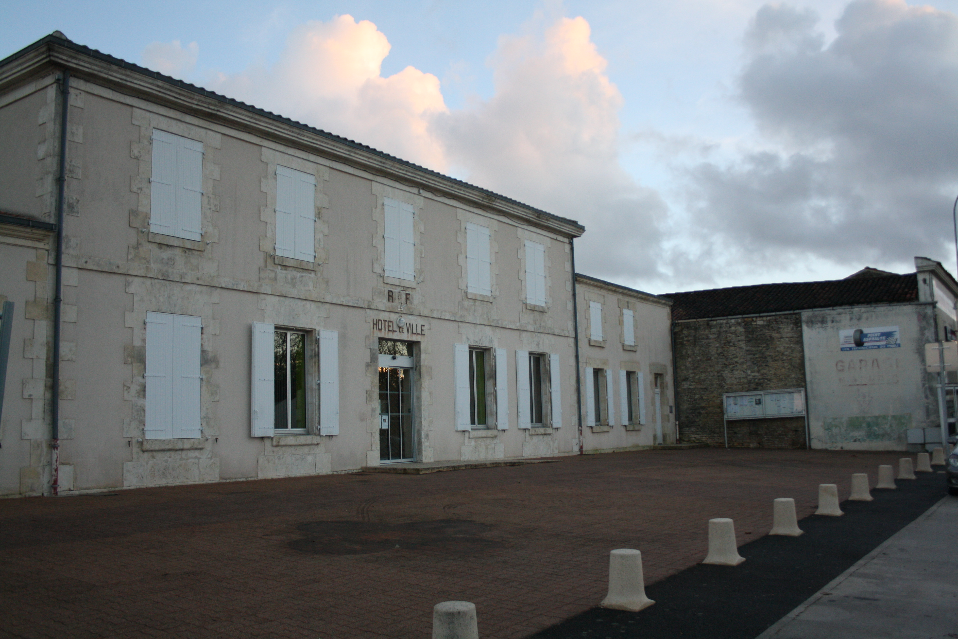 Mairie de Saint-Hilaire-de-Villefranche, Charente-Maritime (France).